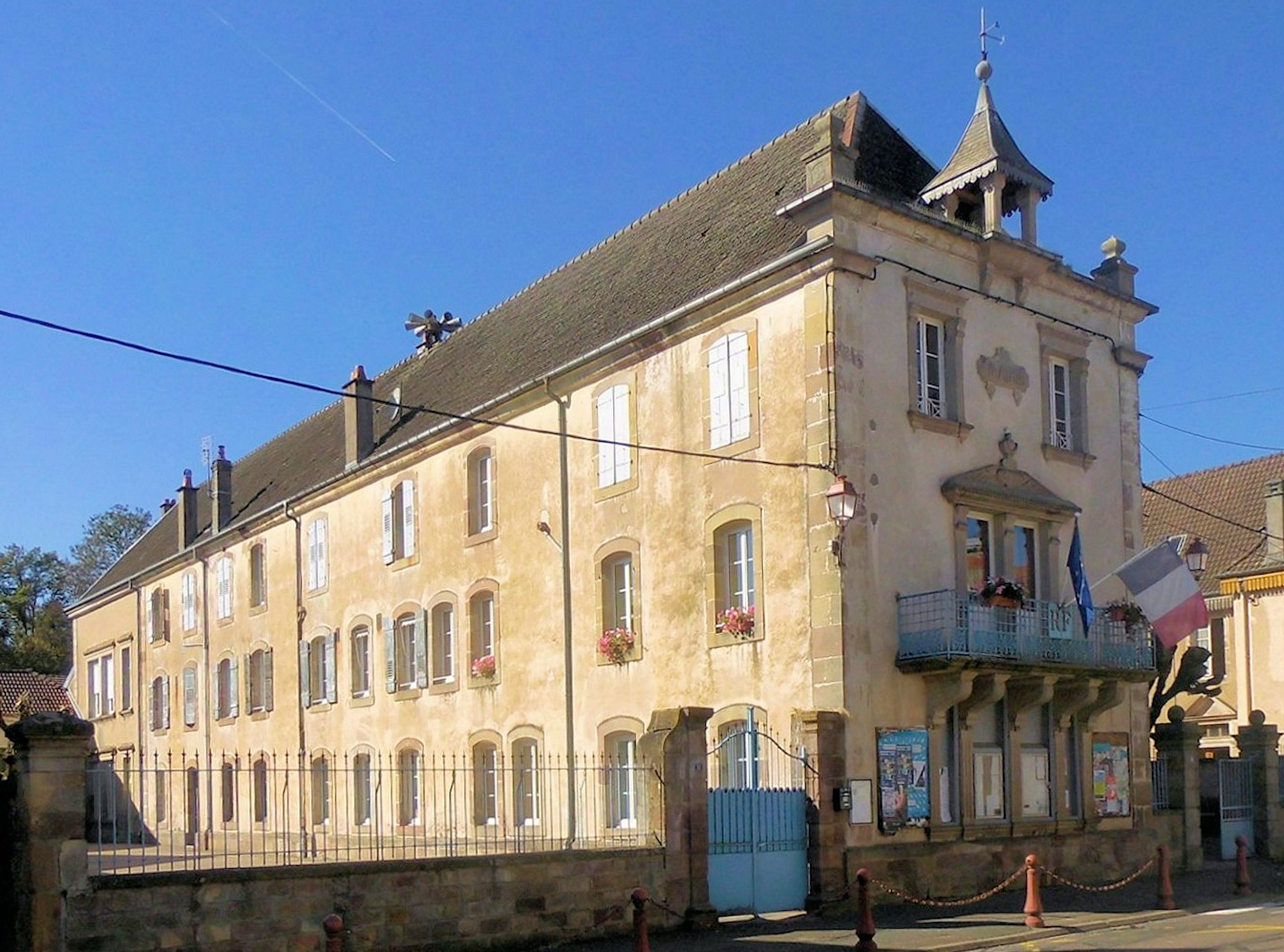 La mairie-école de Conflans-sur-Lanterne